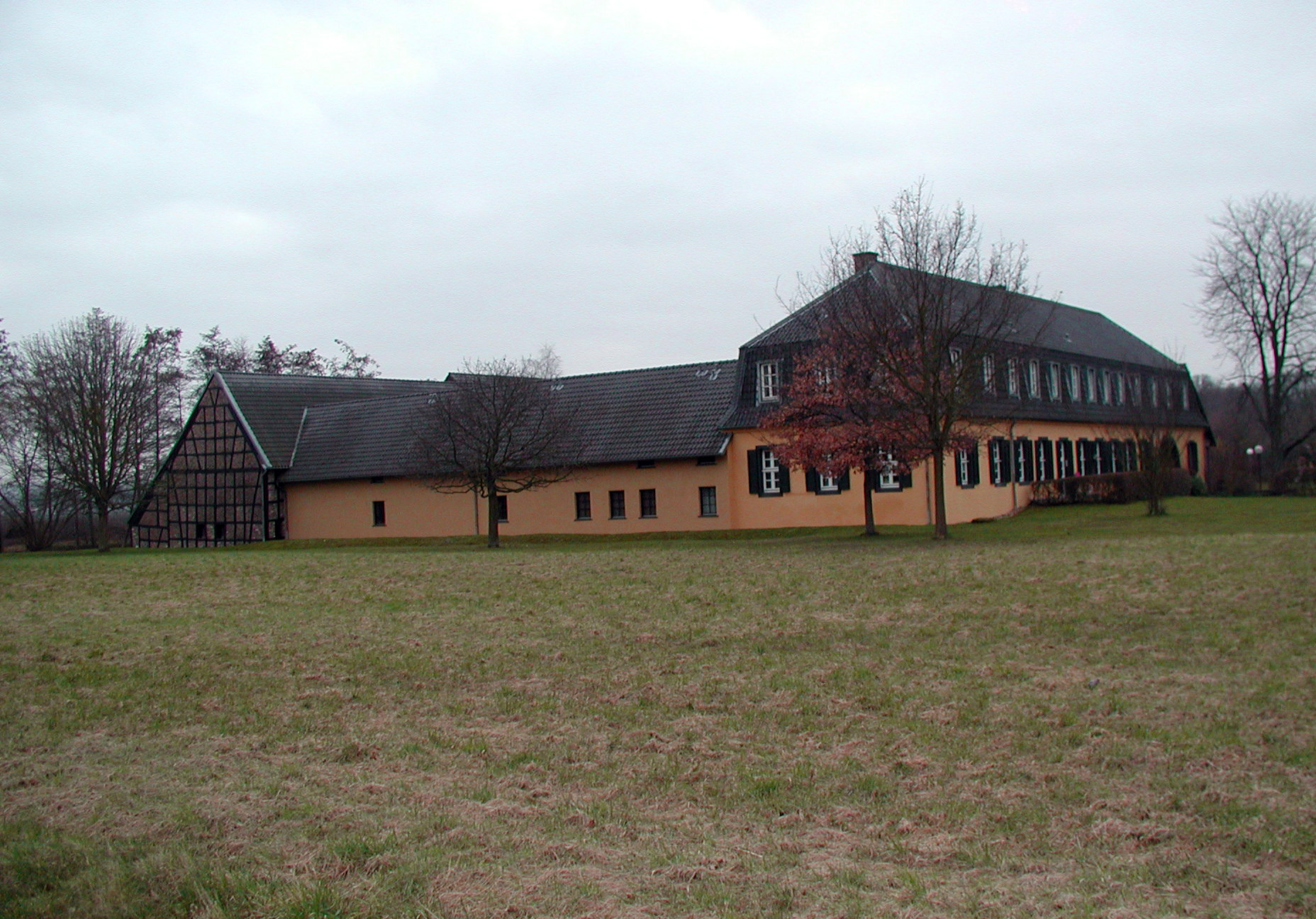 Brühl, Palmersdorfer-Hof